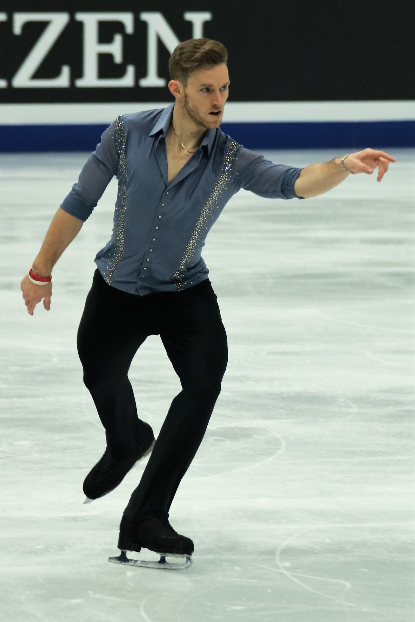 Филлип Харрис (Великобритания) на Чемпионате Европы по фигурному катанию 2018.